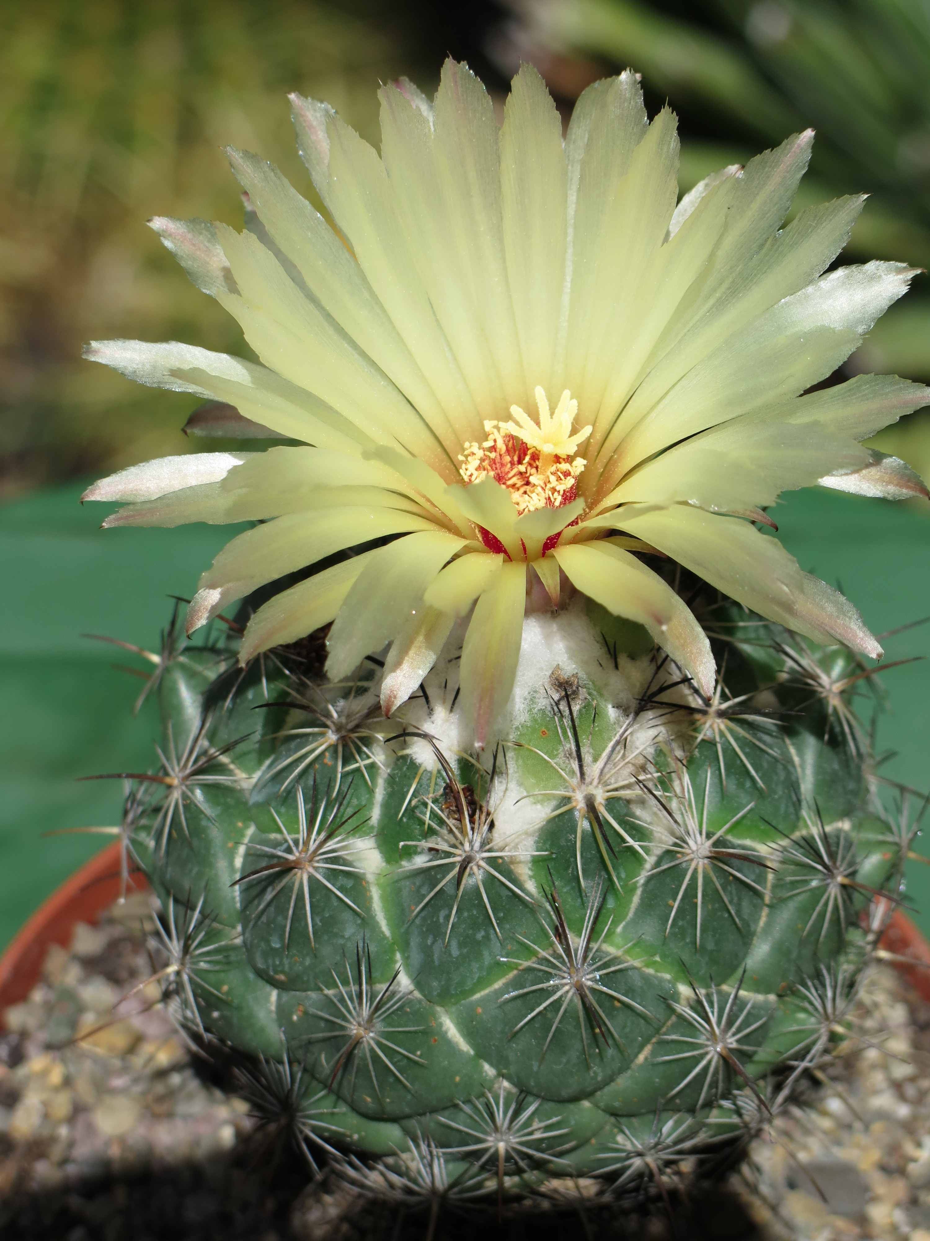 Coryphantha delicata in fiore